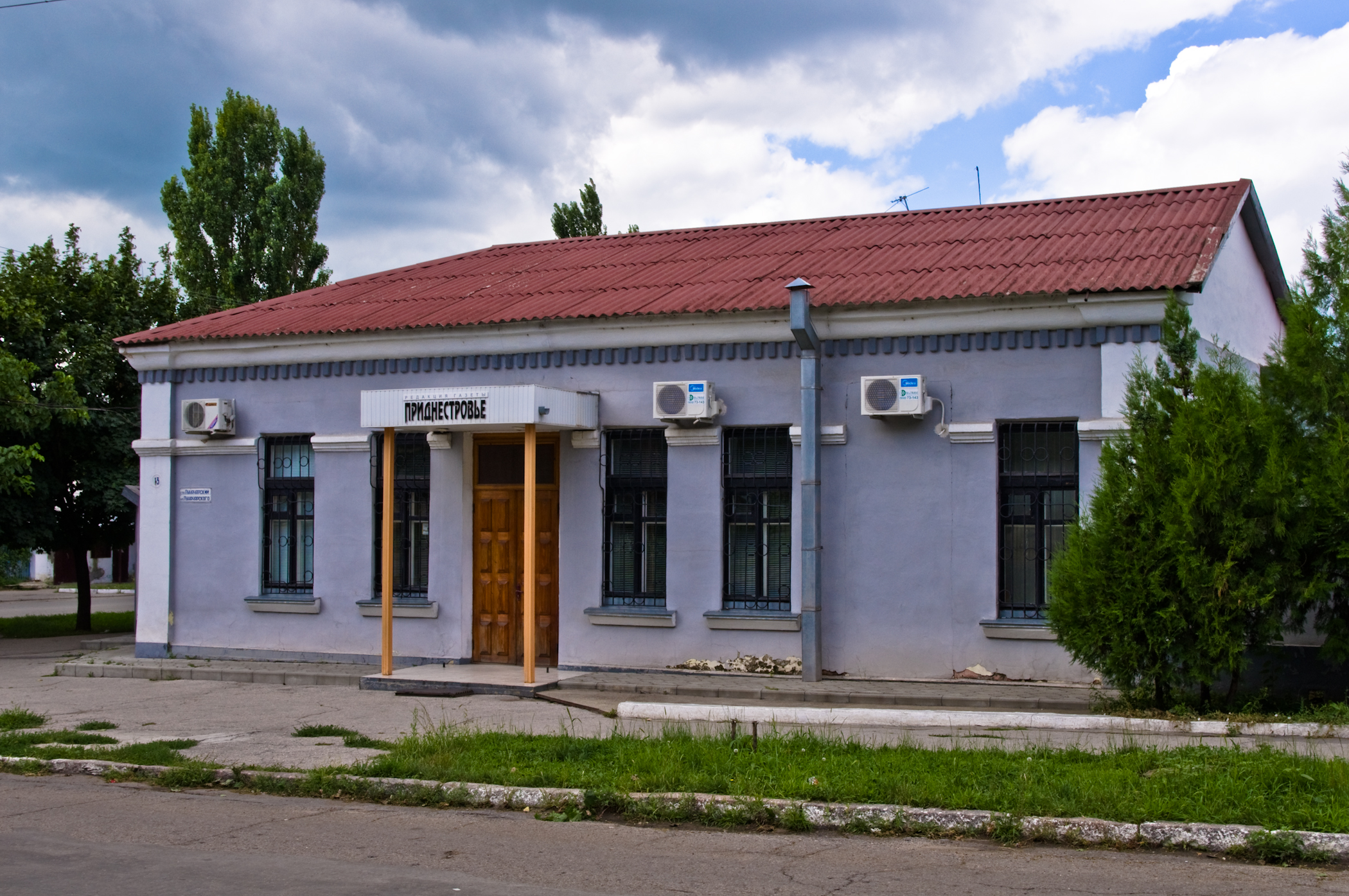 Редакция газеты Приднстровье